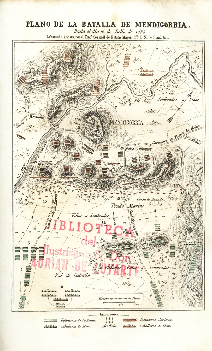 Plano topográfico de la batalla de Mendigorría. "Galería Militar Contemporánea". Madrid 1846